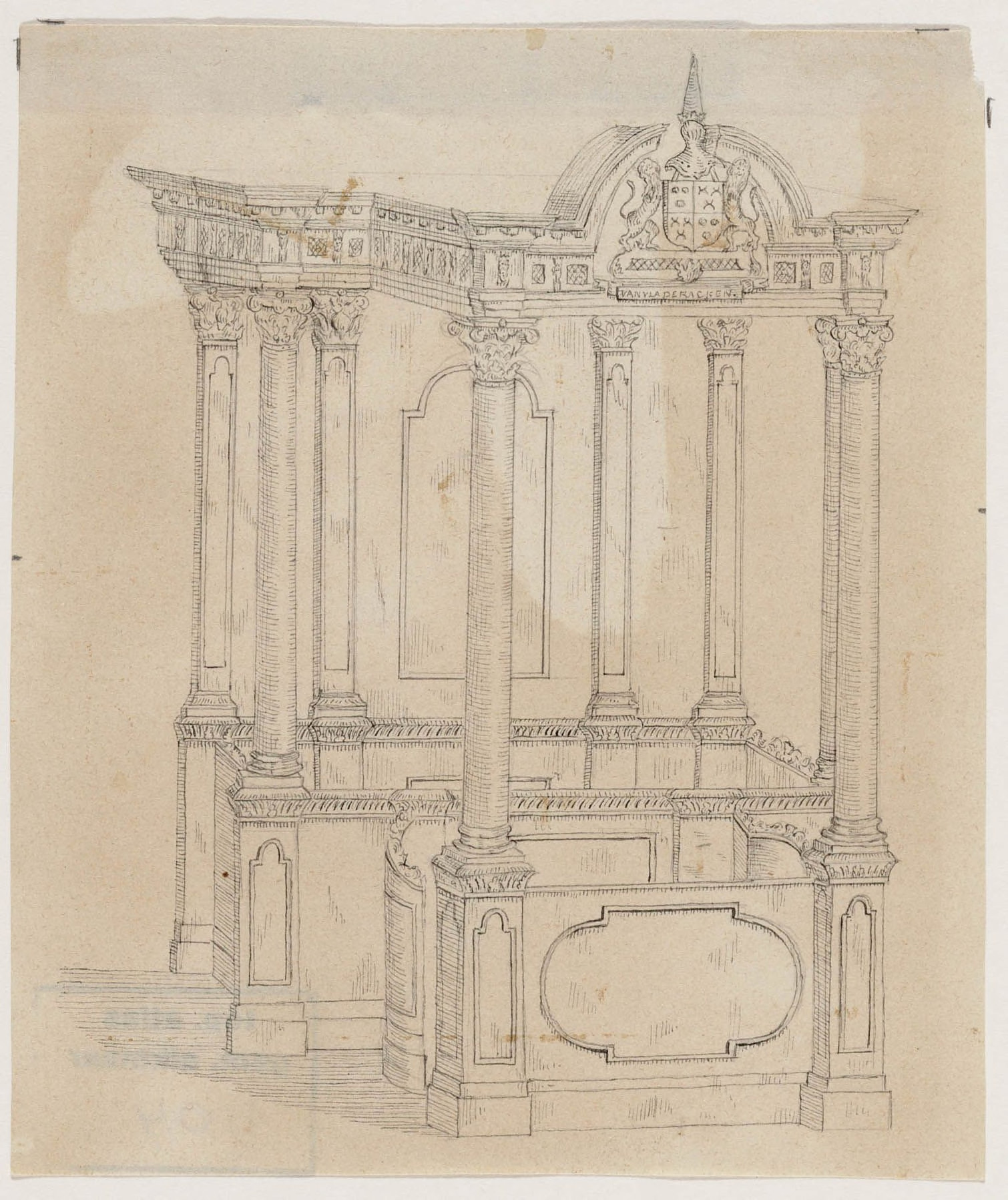 Catalogusnummer: PR 1001104 Plaats: Egmond aan den Hoef Beschrijving: De herenbank van het geslacht van Vladeracken in de Slotkapel. Datering: 1900 Vervaardiger: Bruinvis, C.W.